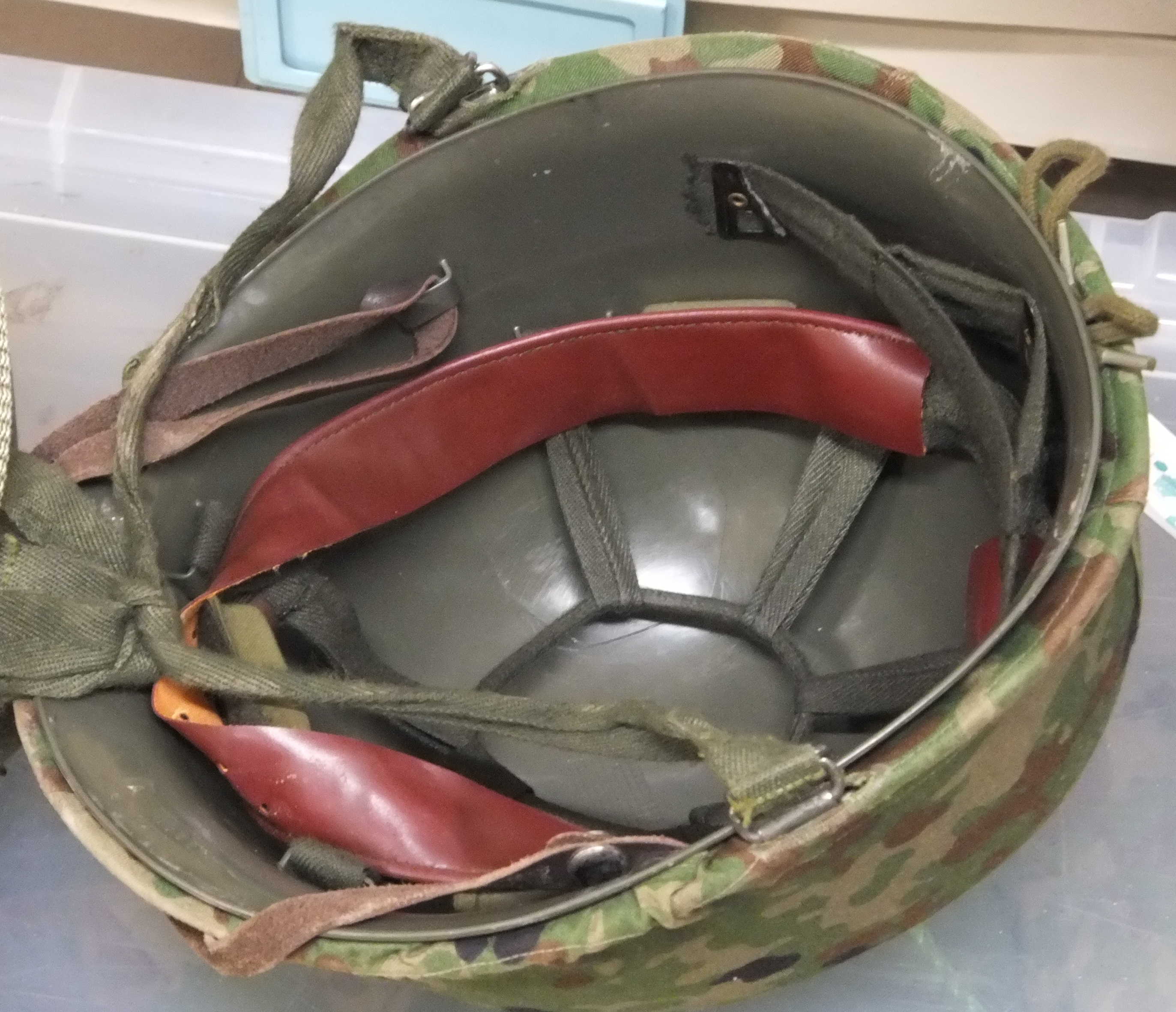 相当昔に使用していた66式鉄帽の内側です。内側のライナーの顎紐はひさし側に引っ掛けていました。旧型ですので内側は布張りでした。今は化学繊維に置き換わっていると聞いています。